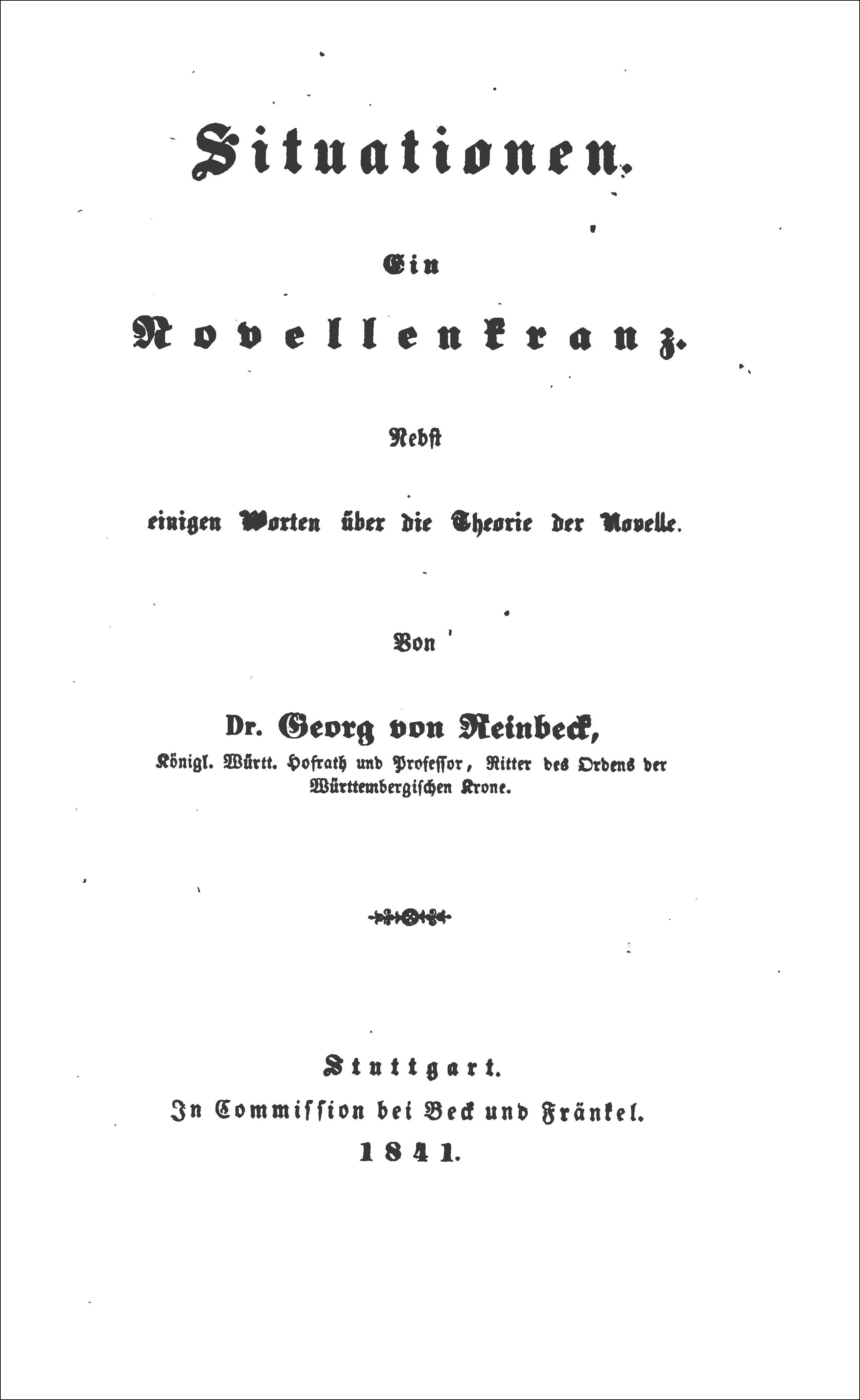 Titelseite von: Georg Reinbeck: Situationen. Ein Novellenkranz. Stuttgart 1841.